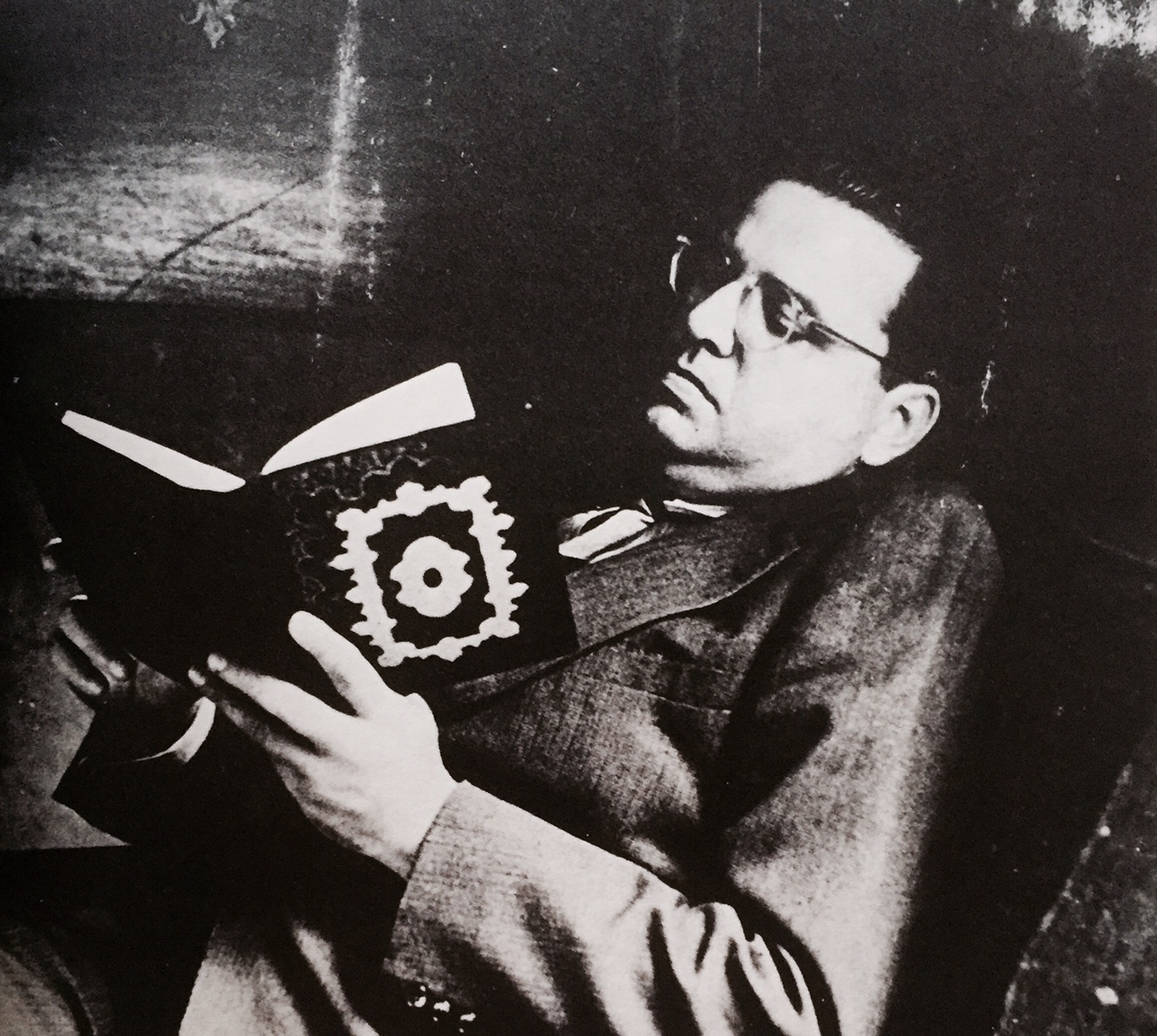 El escritor Mariano Picón Salas (1901-1965) en su apartamento de Caracas.